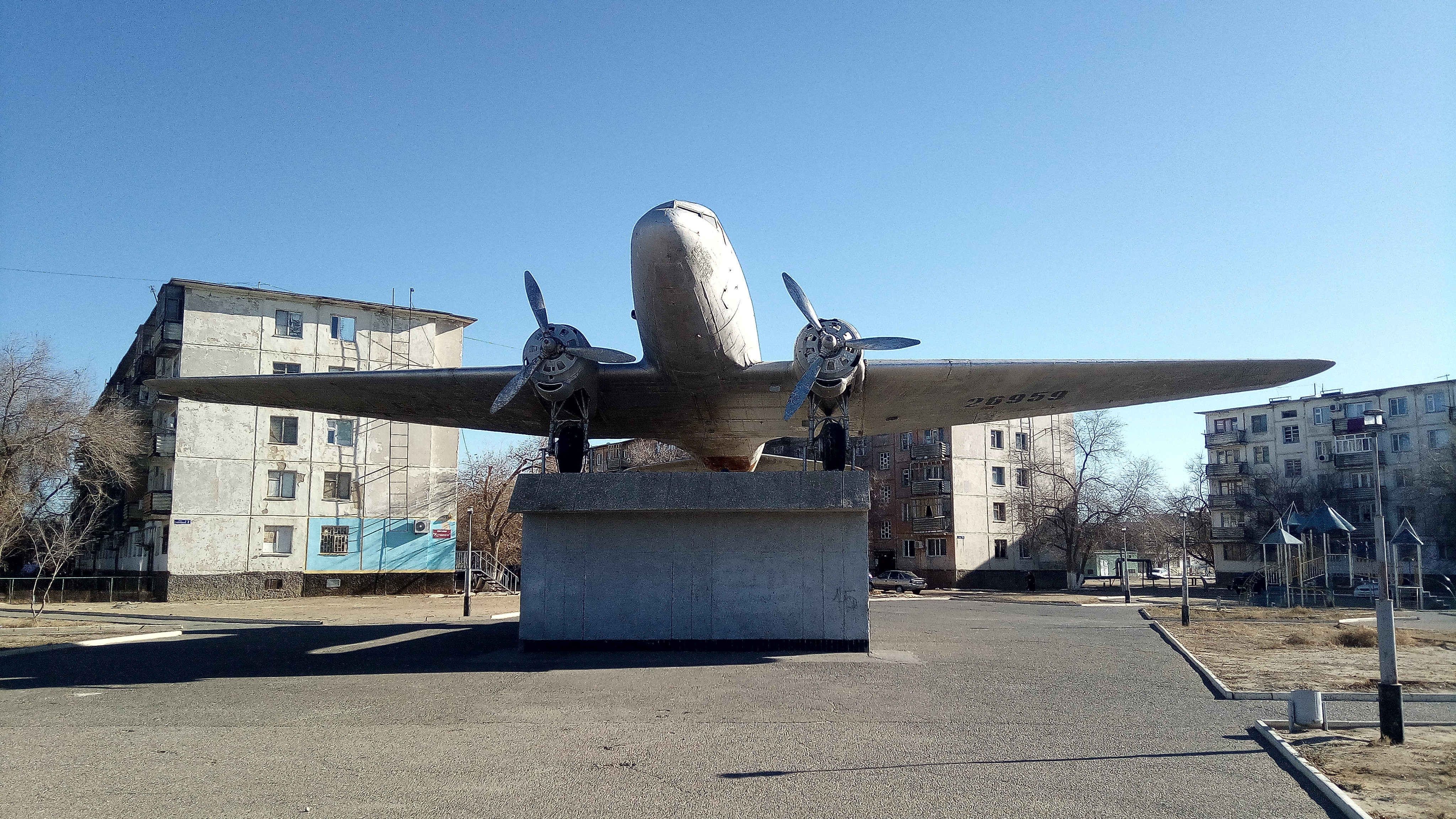 Памятник самолёту Ли-2 (Байконур)